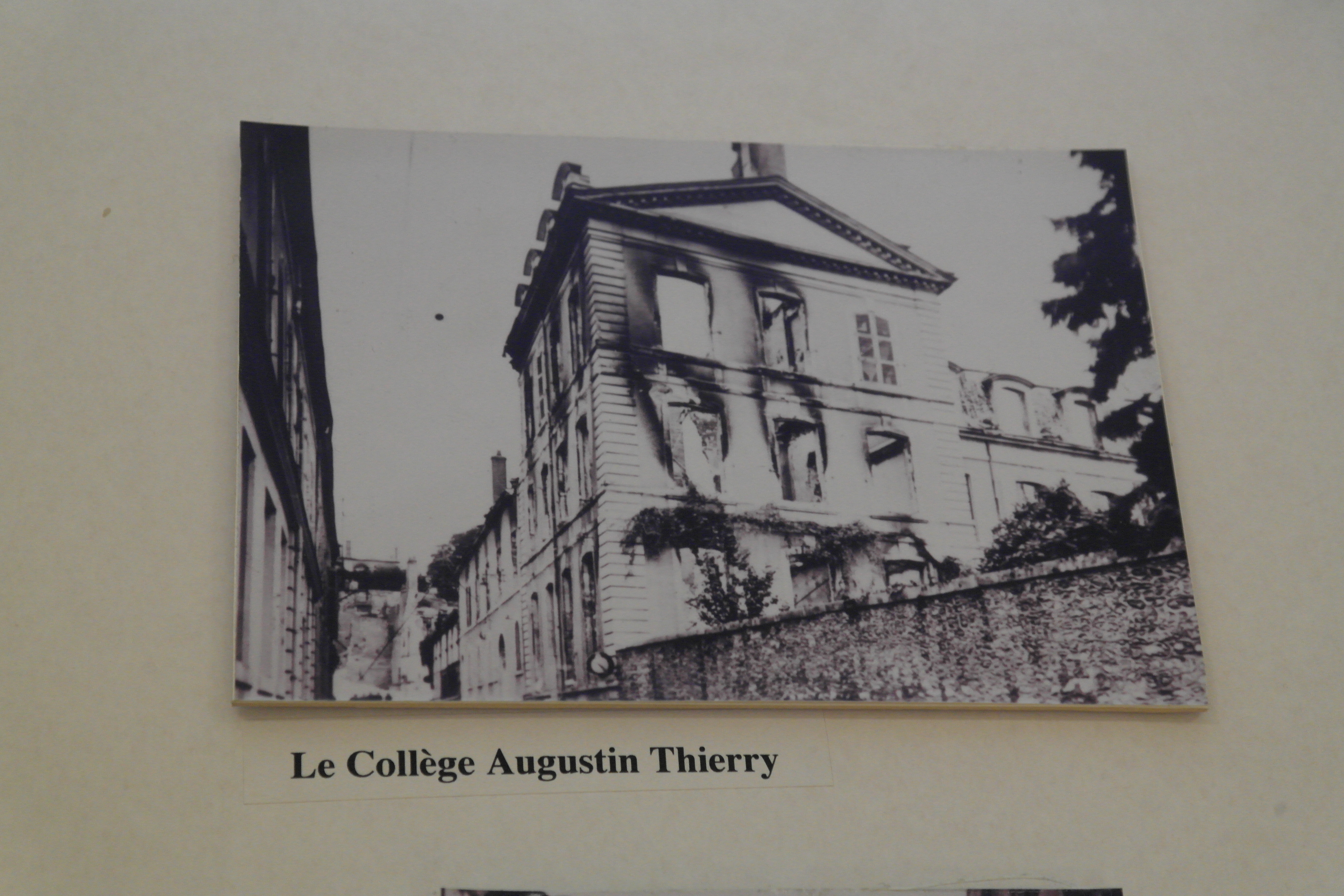 Ruines du collège Augustin-Thierry de Blois après les bombardements allemands et l'incendie qui dure du 16 au 21 juin 1940. Photo conservée au musée de la Résistance, de la déportation et de la Libération en Loir-et-Cher.